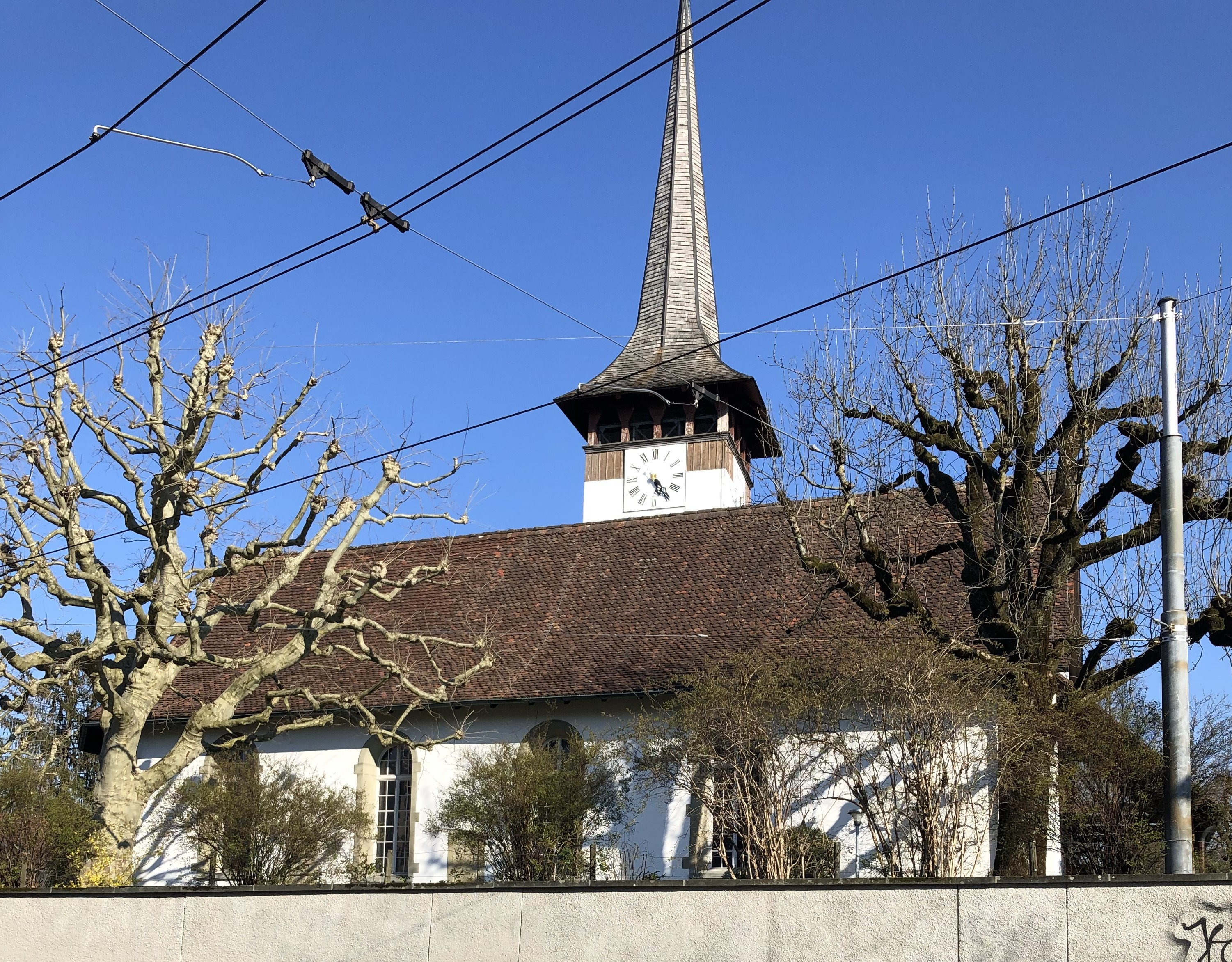 Kirche Bümpliz